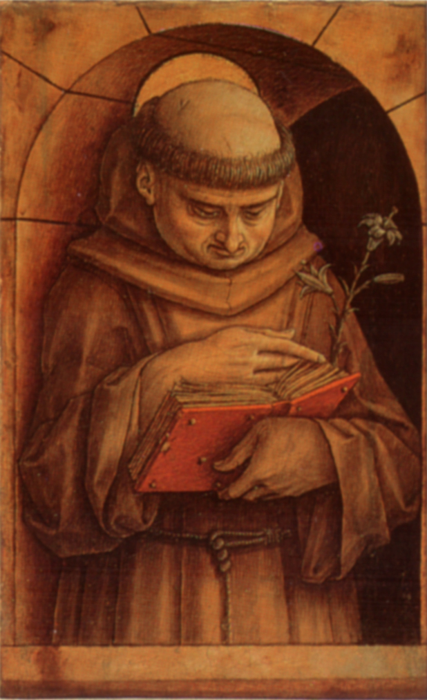 Carlo crivelli, sant'antonio da padova, esztergom 2